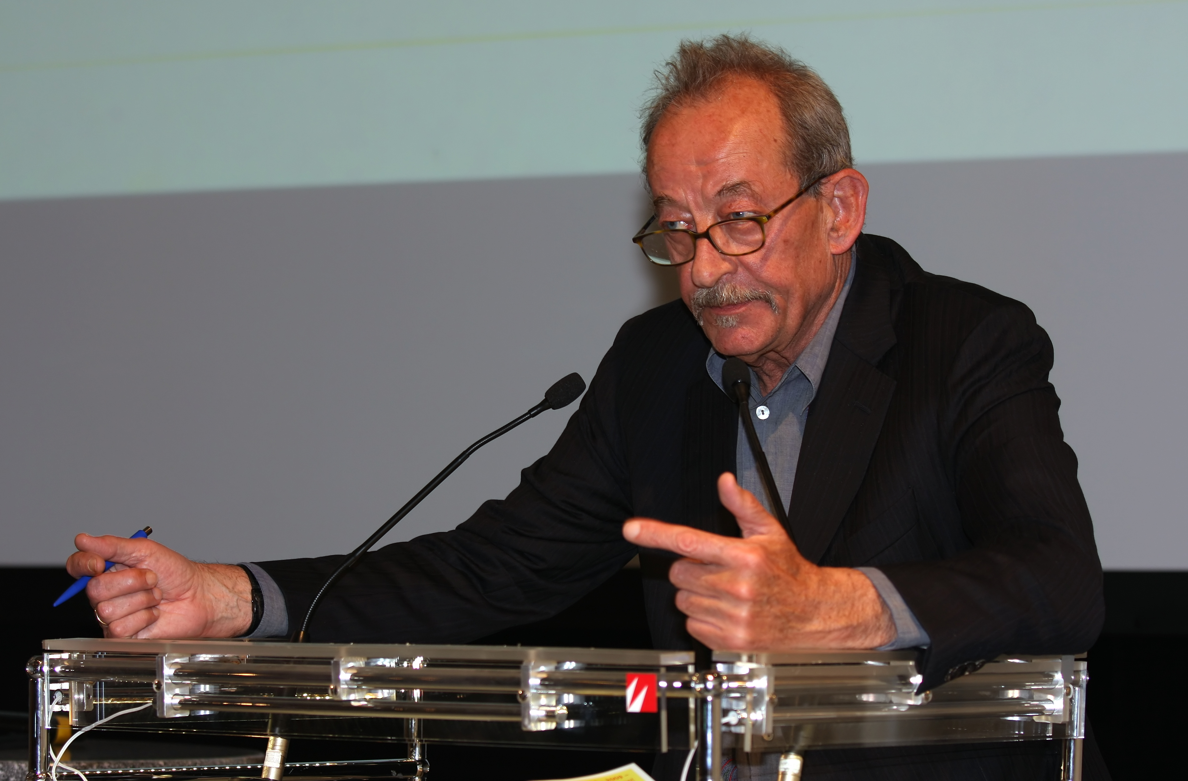 Kasper König, Direktor des Museum Ludwig in Köln, auf der Veranstaltung „Aus der Geschichte lernen - Die Kölner Friedensverpflichtung leben“ im Gürzenich im Rahmen von „Köln stellt sich quer“.